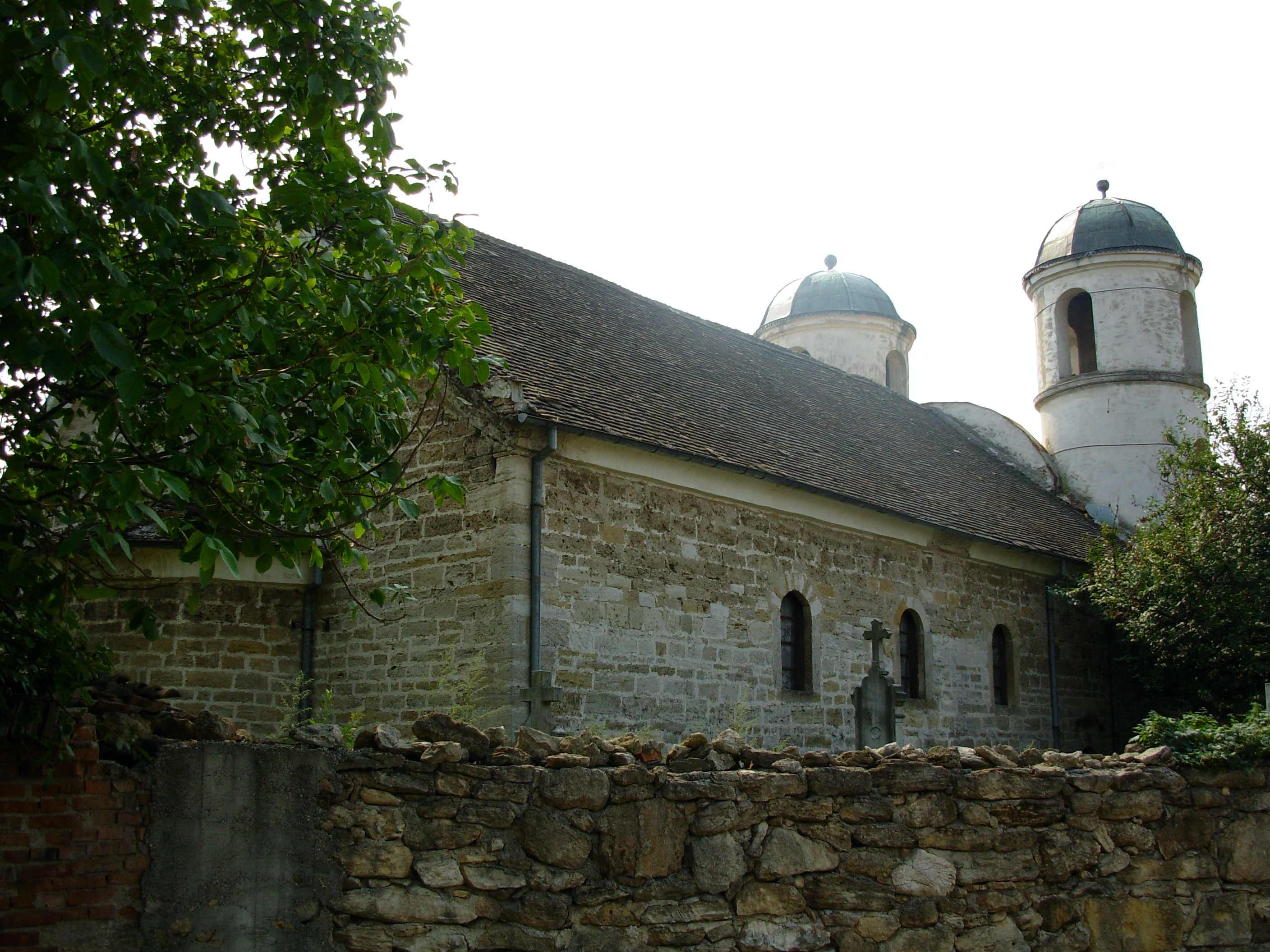 „Успение на Пресвета Богородица“ 1855 в Брегово